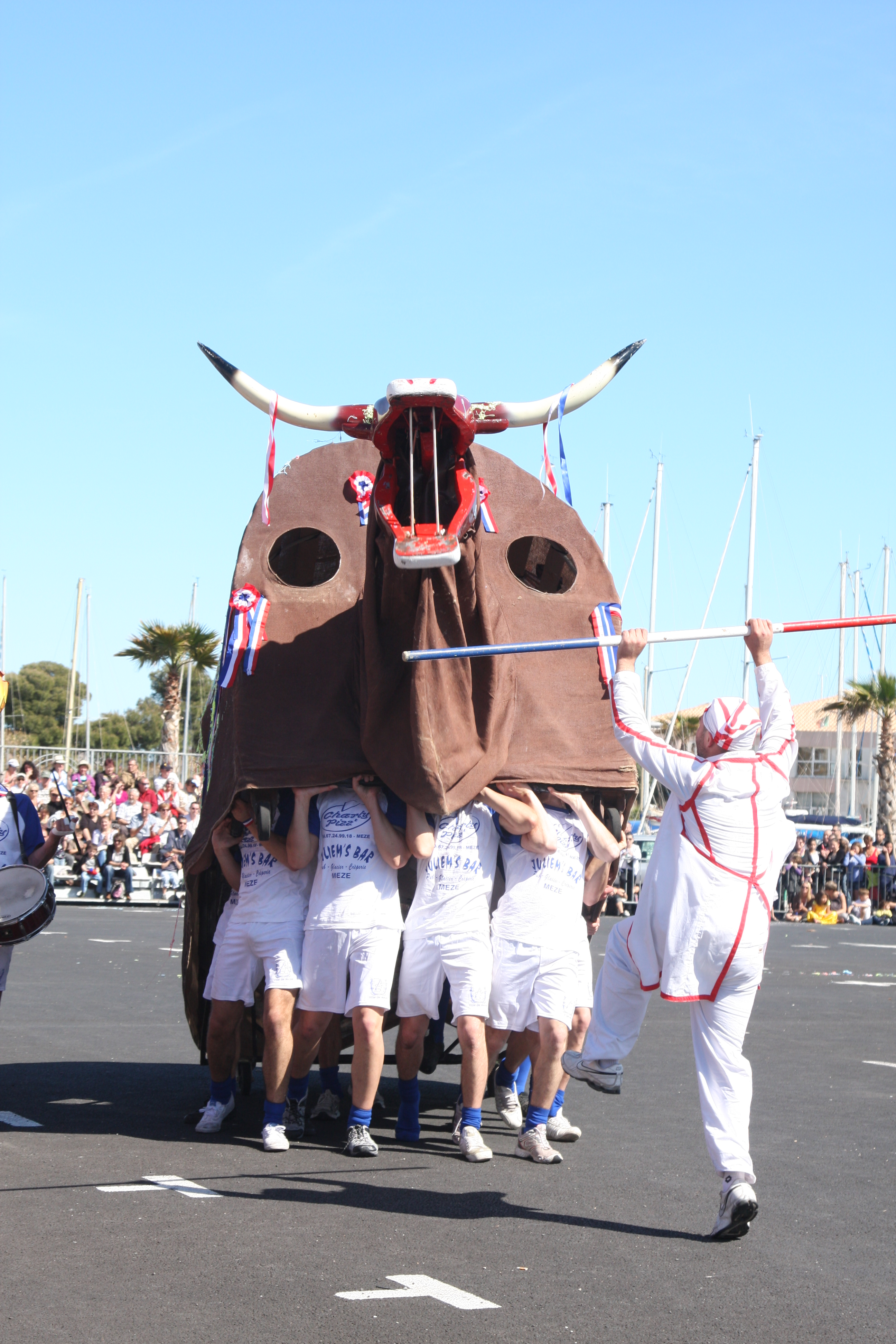 Sortie du Boeuf de Mèze lors du corso du 1er Mai 2012. Parade sur le port.